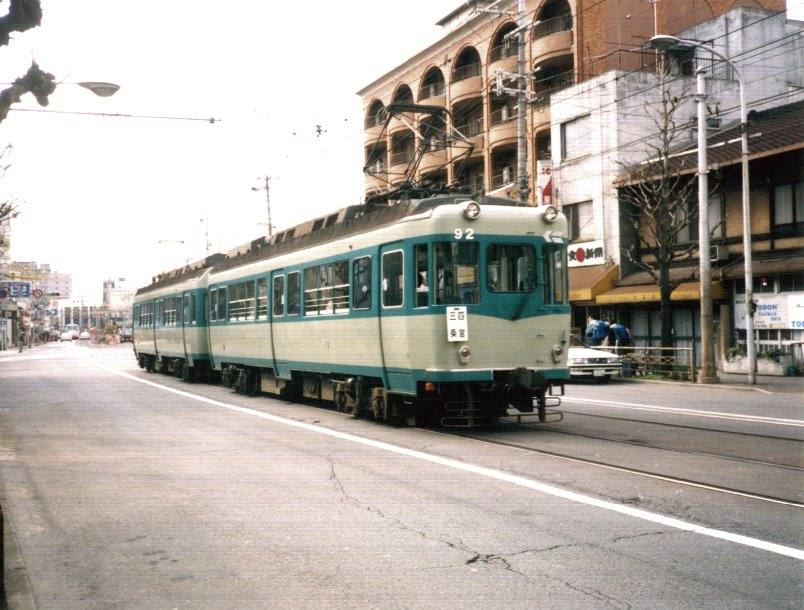 現役当時のja:京阪80型電車 92号 京都市東山区内の併用軌道区間（東山三条駅～蹴上駅）にて